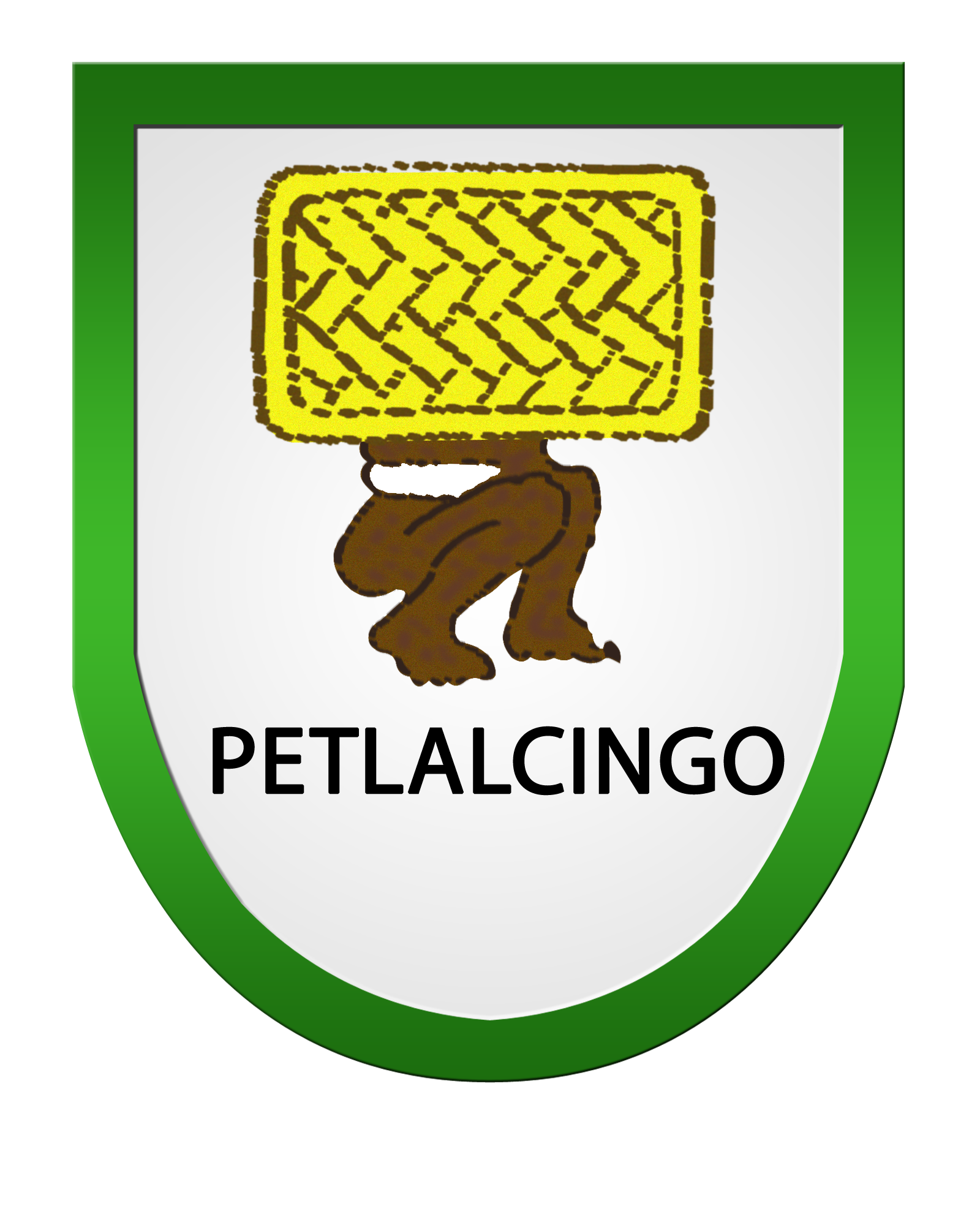 Escudo-glifo del municipio de Petlalcingo, Puebla. México. Etimología: Petlalcingo deriva del nahuatl "petatl = estera/petate", "tzintli = expresión de diminutivo" y "co = preposición, en". "lugar de petatillos o lugar de petates finos". El escudo hace referencia a la etimología de la toponimia. 03:46, 13 Noviembre 1994